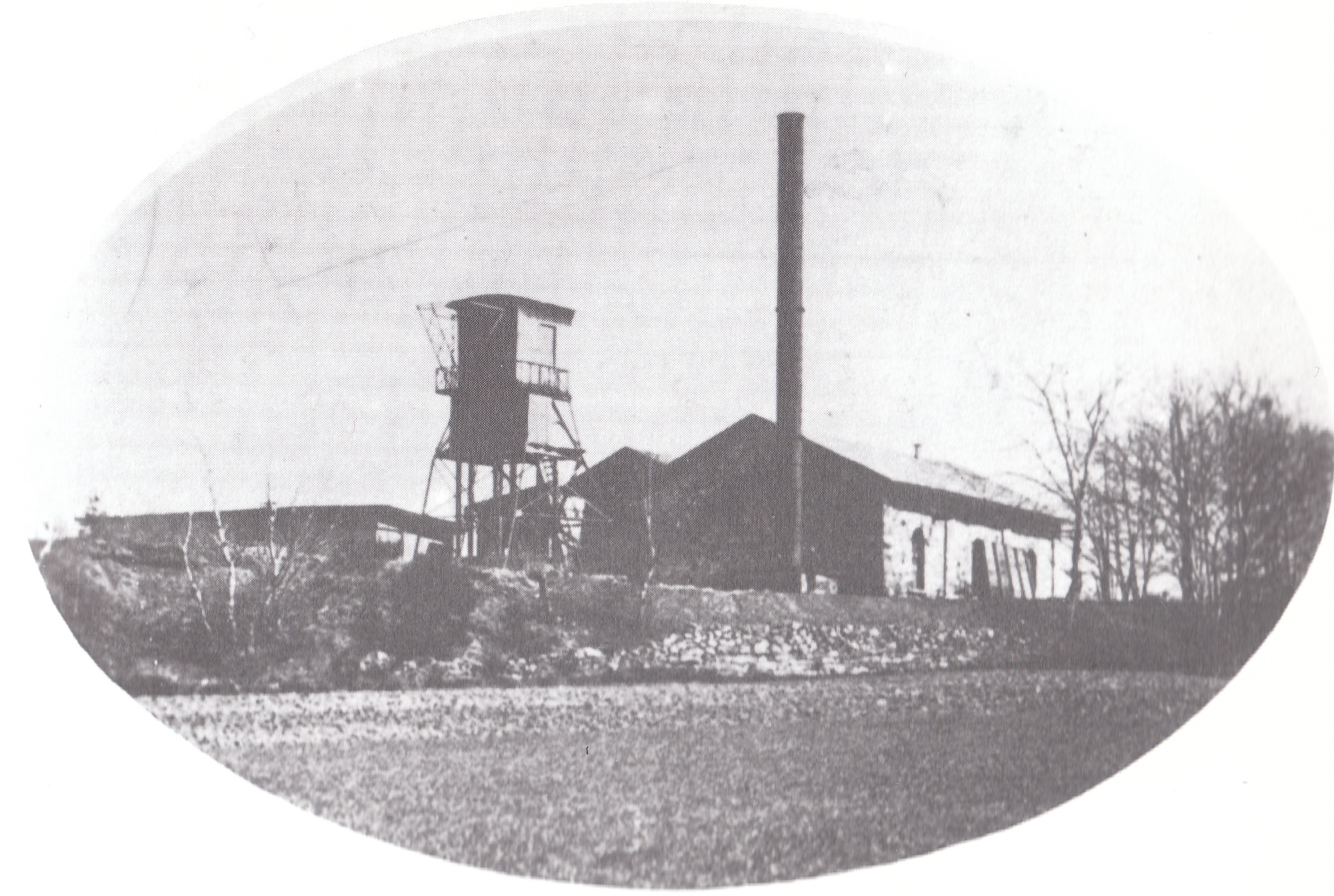 Foto des Seilschachtes in Ibbenbüren. Dieser befand sich in der nähe des von Oeyenhausenschachtes. Die Stilllegung des Schachtes war 1893. Das Bild ist im Jahr 1870 entstanden und zeigt den Förderturm und die Betriebsgebäude des Schachtes.